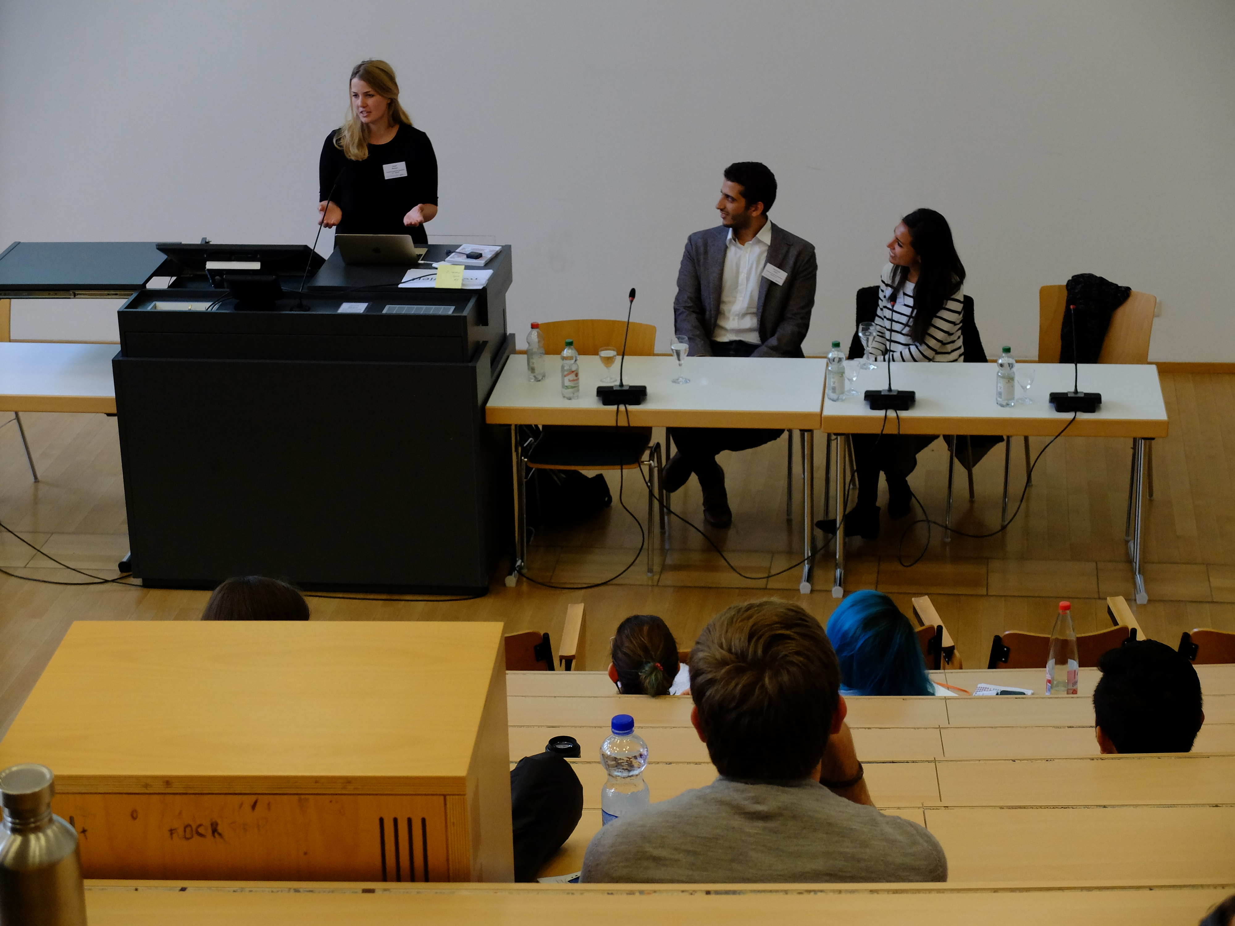 Präsentation von academic experience worldwide auf dem Kongress der DGS 2016 in Bamberg